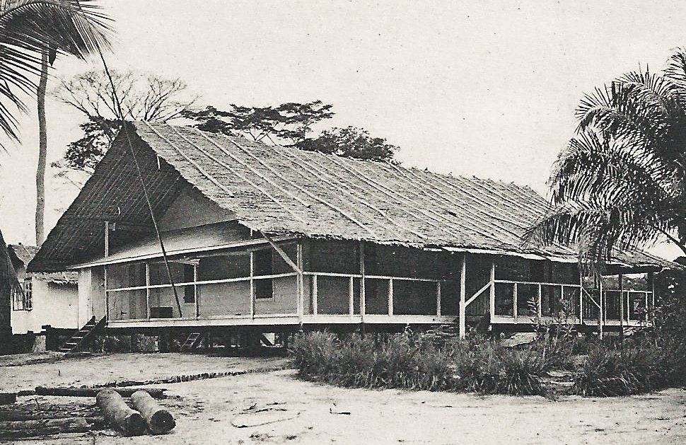 Congo. Maison missionnaire à Talagouga [carte postale recadrée]. pas de mention d'auteur, d'éditeur ou de date